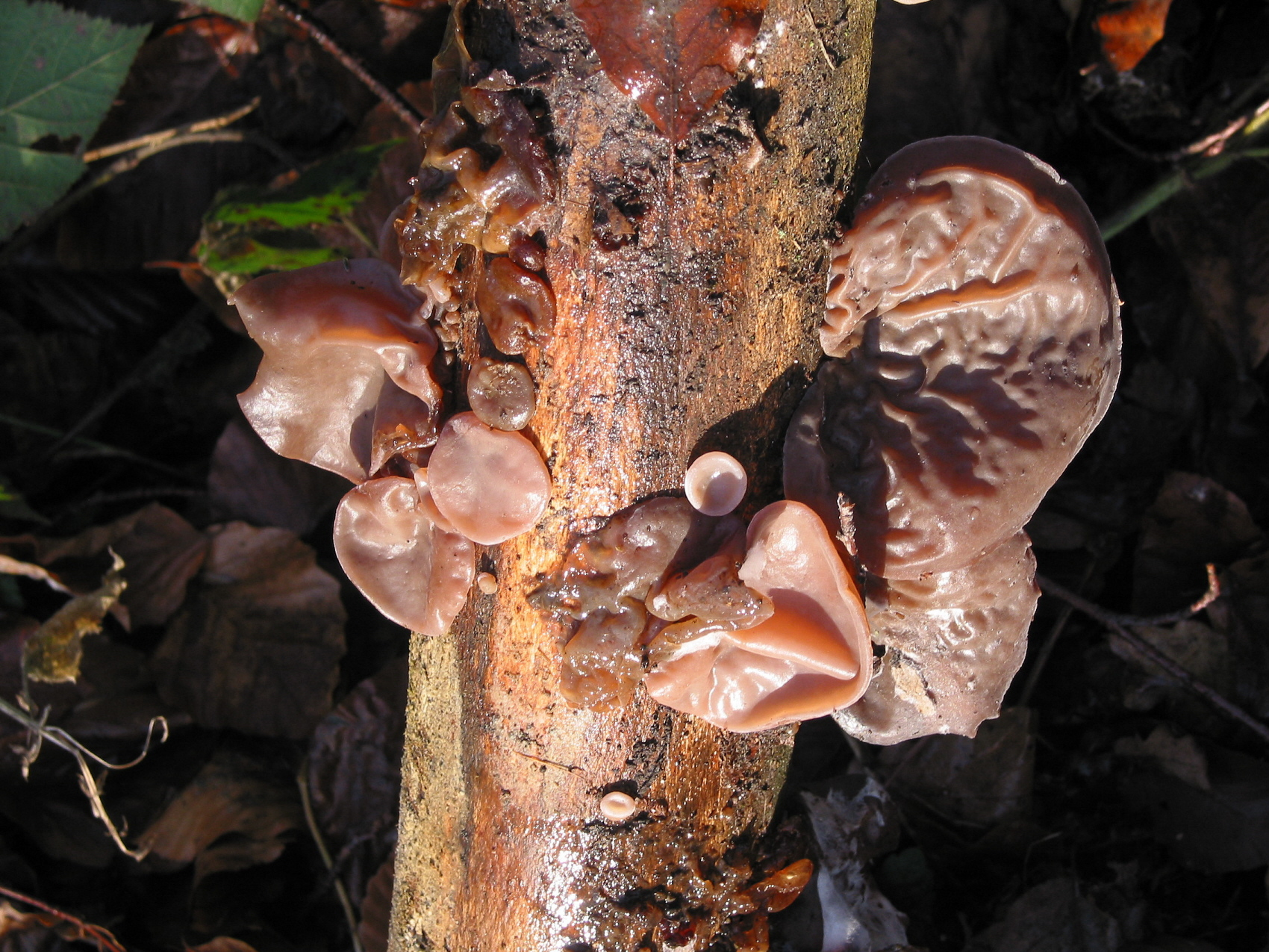 Auricularia auricula-judae (Belgique/Belgium), sur bois mort (forêt de hêtres et de chênes)./ on deadwood (beeches and oaks forest). Auteur/Author : Jean-Pol Grandmont (Collection personnelle/Private collection). Document publié avec l'accord de l'auteur /Document published with the author agreement (Jean-Pol Grandmont). Date de la prise de vue/Capture date: Année/Year - Mois/Month - Jour/Day : 2005-01-13